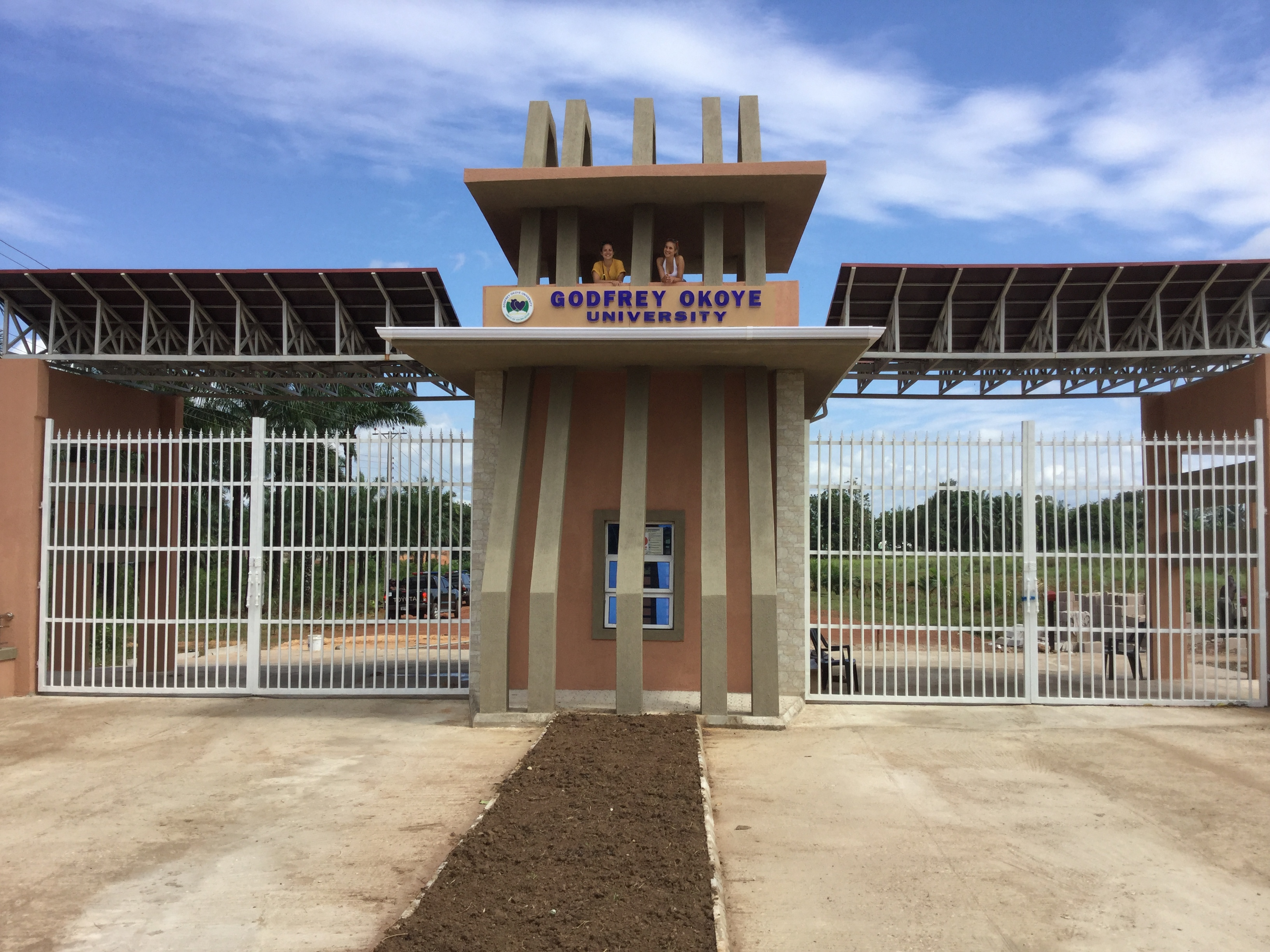 Neues Tor zum Campus der permanenten Site in Ugwuomu Nike